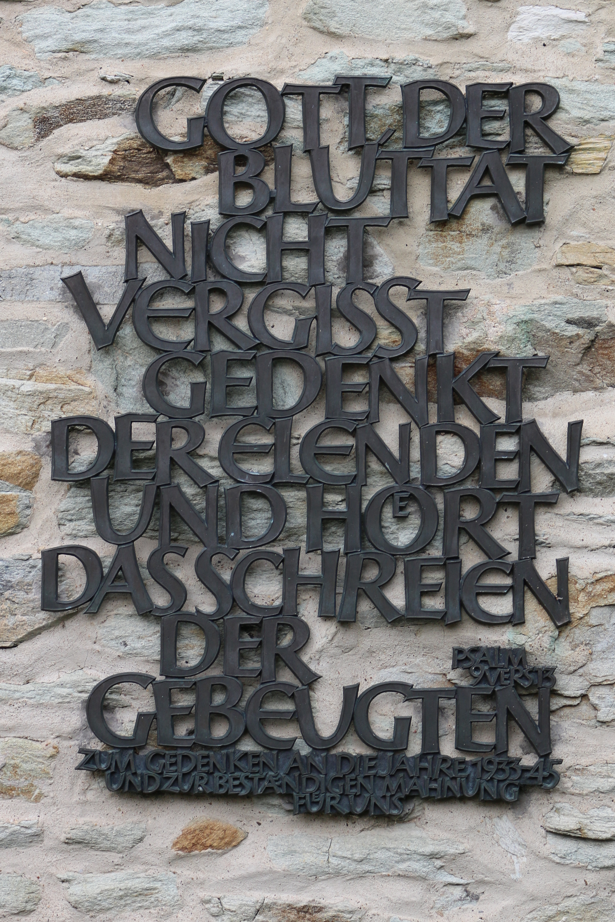 Sonnenberg: Worte aus Psalm 9 an der Außenwand der Thalkirche als Mahnmal für Zeit 1933-45